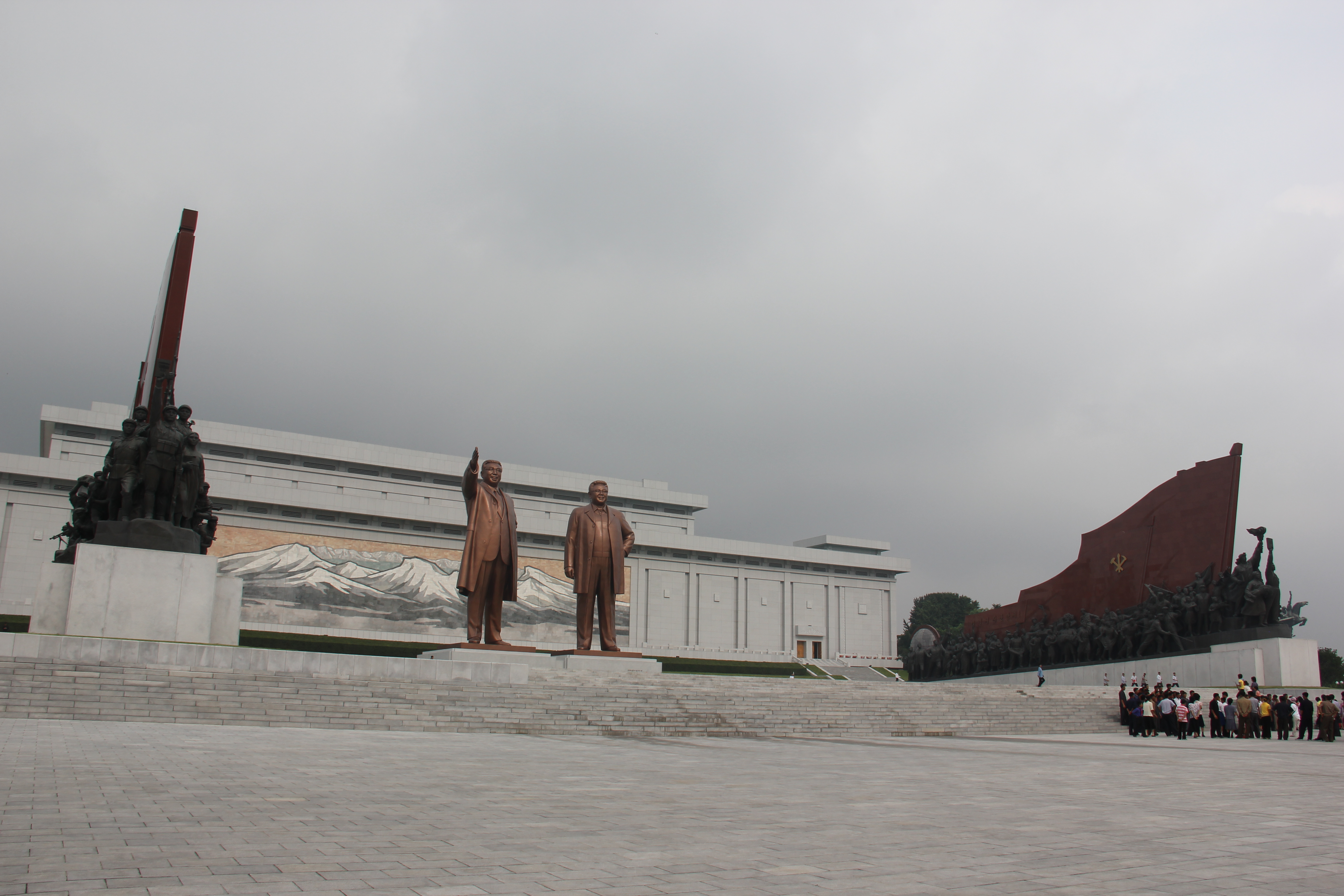 Mansudae Grand Monument